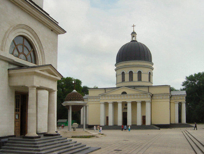 Chisinau, Orthodoxe Kathedraal Parcul Catedralei.